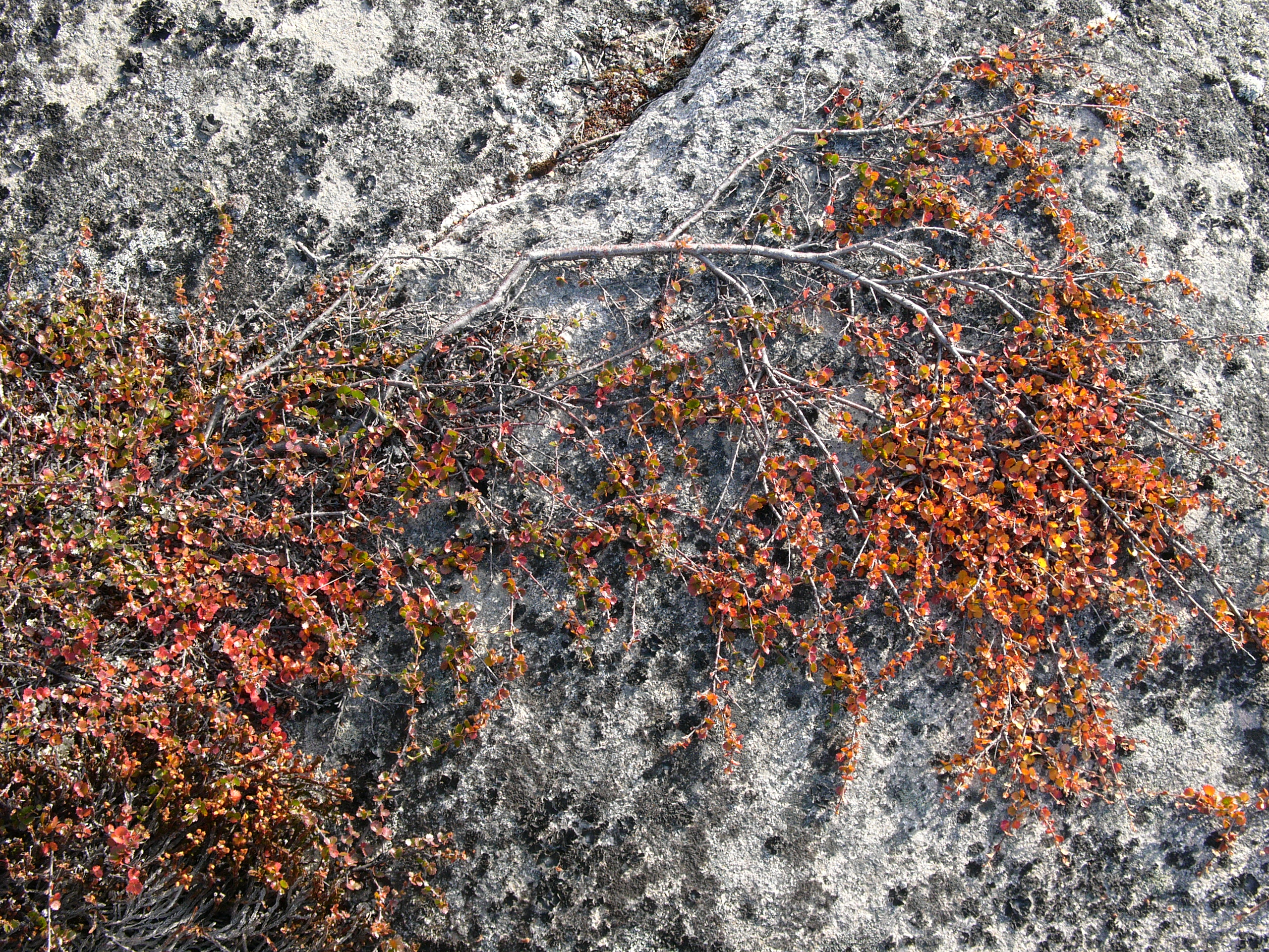 Betula nana in Greenland